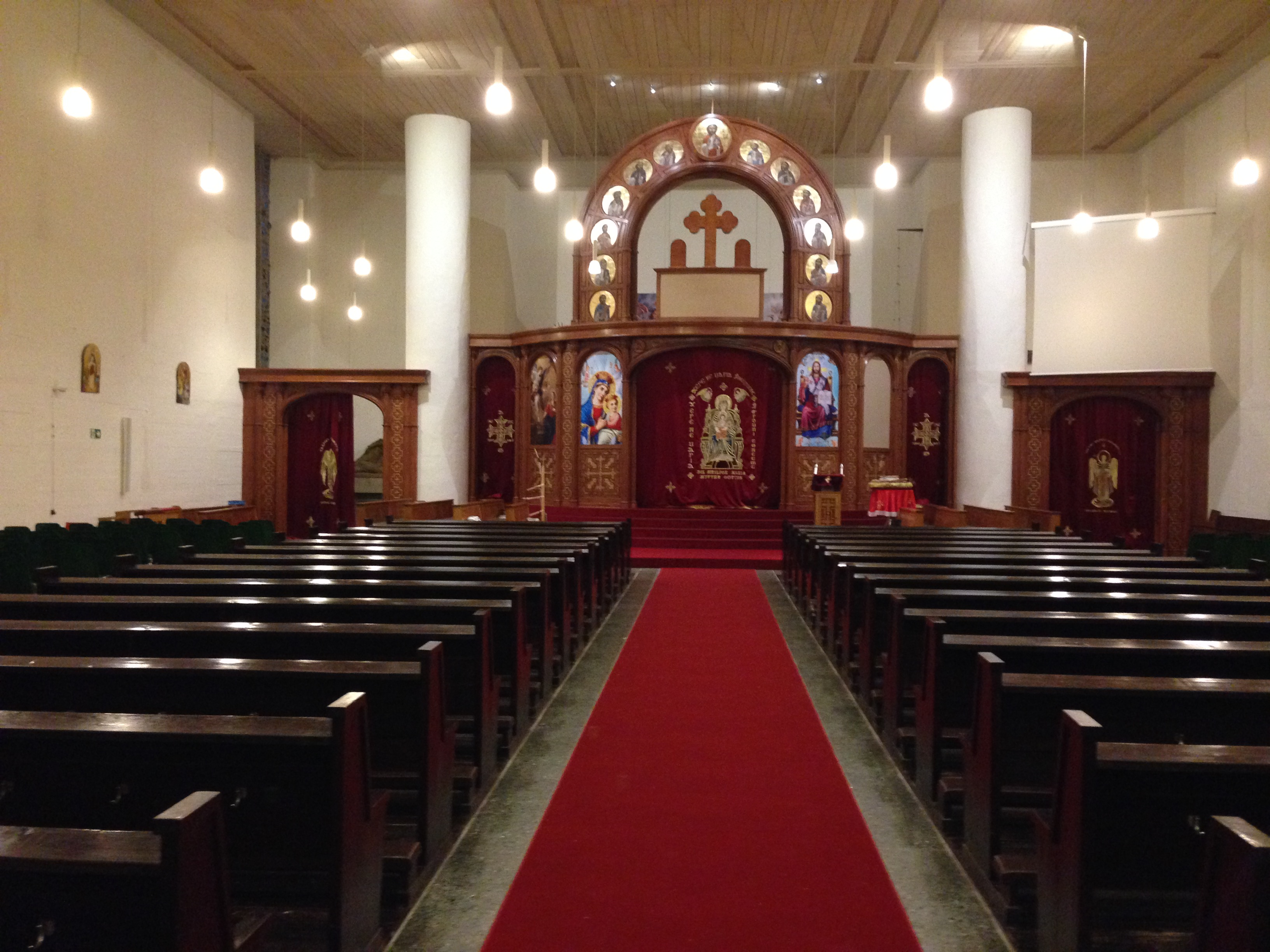 Foto vom 26.11.2017, Bunkerkirche Düsseldorf, mittlerweile wurde eine Ikonostase eingebaut